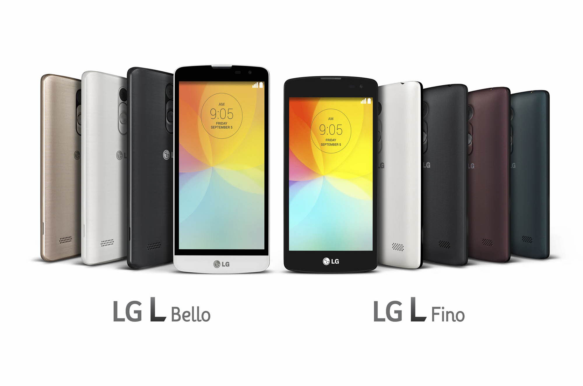 LG전자, 3G시장 겨냥한 ‘L피노’, ‘L벨로’ 공개 ■ ‘L시리즈’ 신제품 ‘L피노’, ‘L벨로’…쿼드코어 AP로 3G시장 공략 ■ 독창적 디자인의 후면키, 프리미엄 UX 등 탑재해 제품 경쟁력 강화 □ ‘터치 & 슛’, ‘셀피 카메라’, ‘노크 코드’ 등 프리미엄 UX 적용 □ 전용 케이스 ‘퀵서클 케이스’ 제공 ■ 이달 브라질, 폴란드 시작으로 중남미, 유럽, 아시아, CIS 등 순차 출시 ※ Social LG전자 ( 에서 관련 보도자료를 확인하실 수 있습니다.